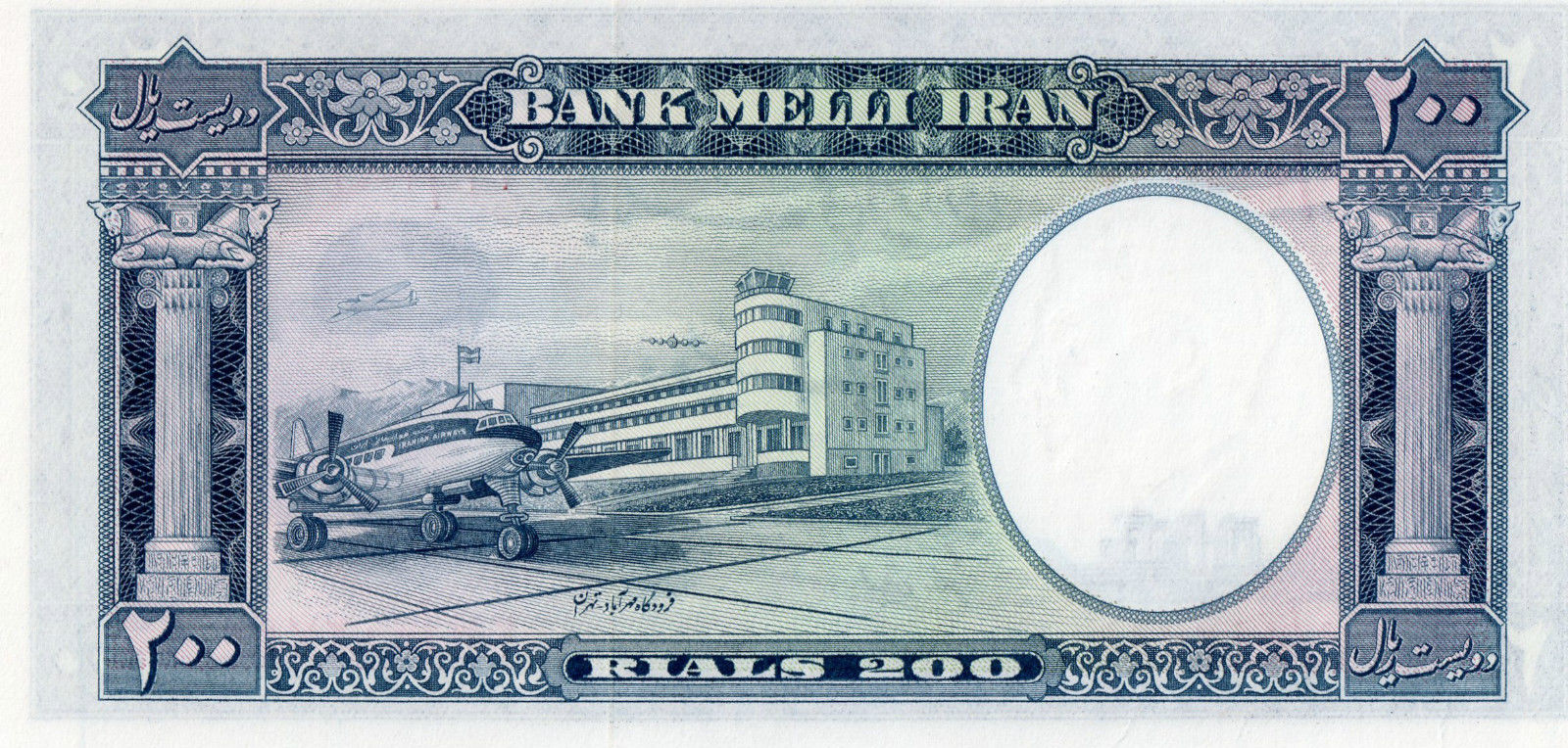 Photo of Lockheed L-749 Constellation Iranian Airways on Iranian banknotes in 50s